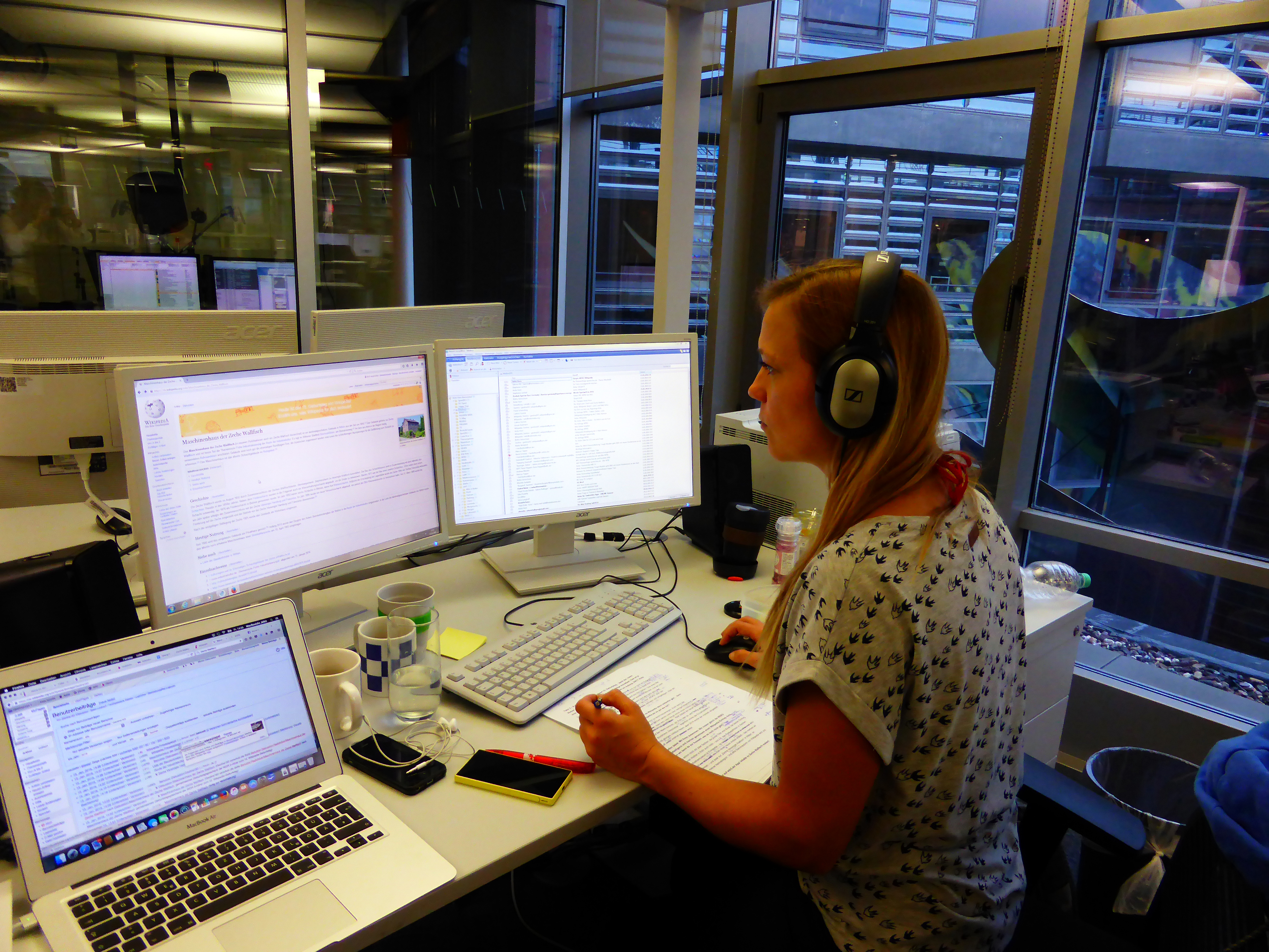 Der WDR 2 schenkt Wikipedia eine Seite zum Geburtstag (Maschinenhaus der Zeche Wallfisch). Reporterin Anita Horn im WDR 2 Hörfunkstudio, Köln am 15. Januar 2016 anlässlich des 15. Geburtstags der Enzyklopädie Wikipedia.